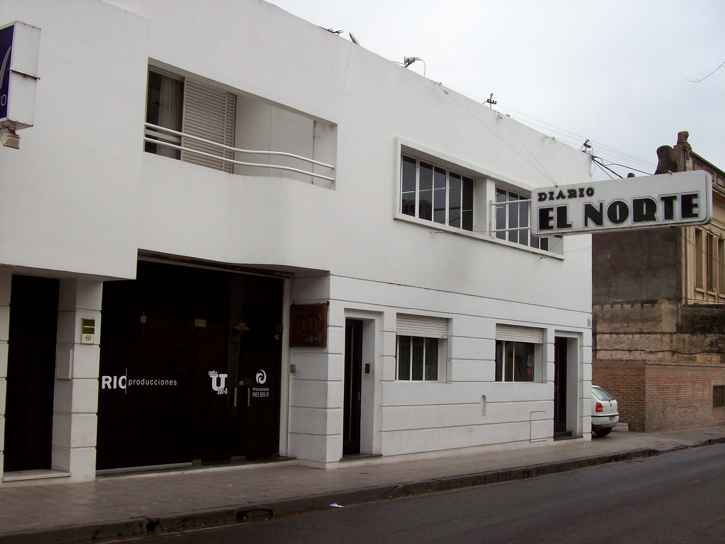 Headquarters of local newspaper Diario "El Norte". San Nicolás, Buenos Aires, Argentina.